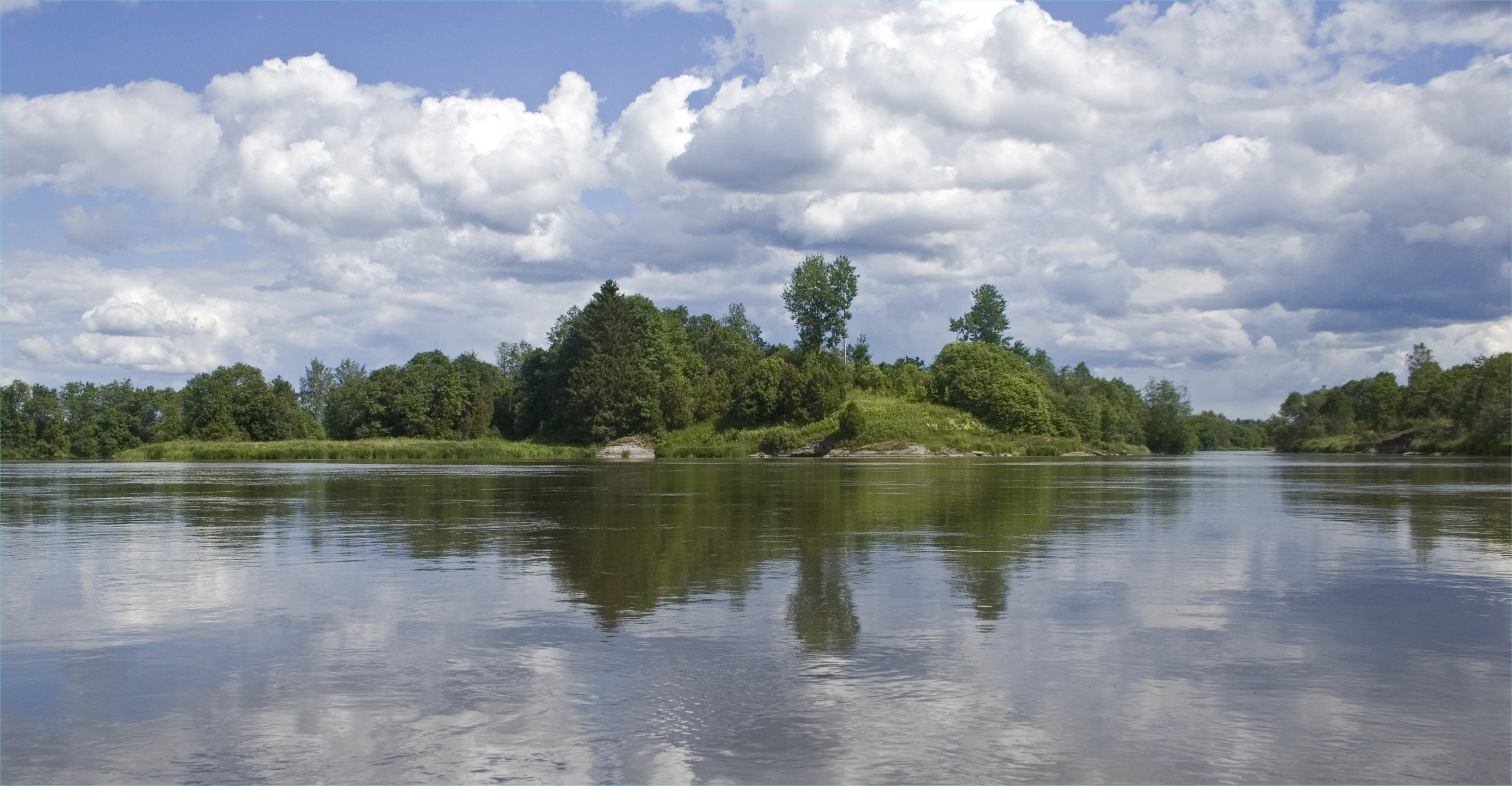 Kokemäen linnaluodossa on ilmeisesti sijainnut muinainen pieni kivilinna. Kalliolla olisi ollut torni ja oikealla oleva väylä esteenä.